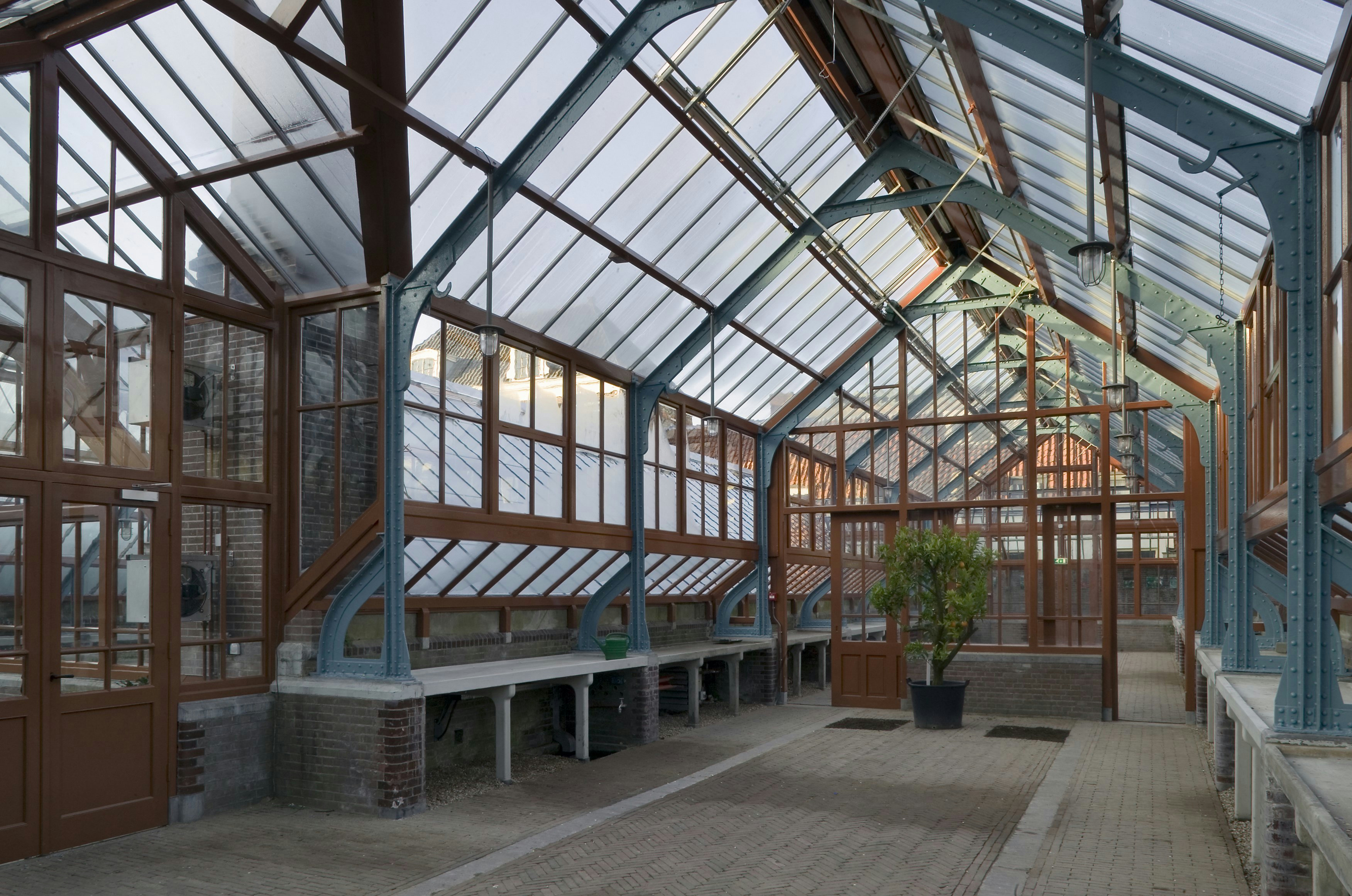 Oude Hortus Botanicus Utrecht: Interieur, overzicht voorzijde hoge kas